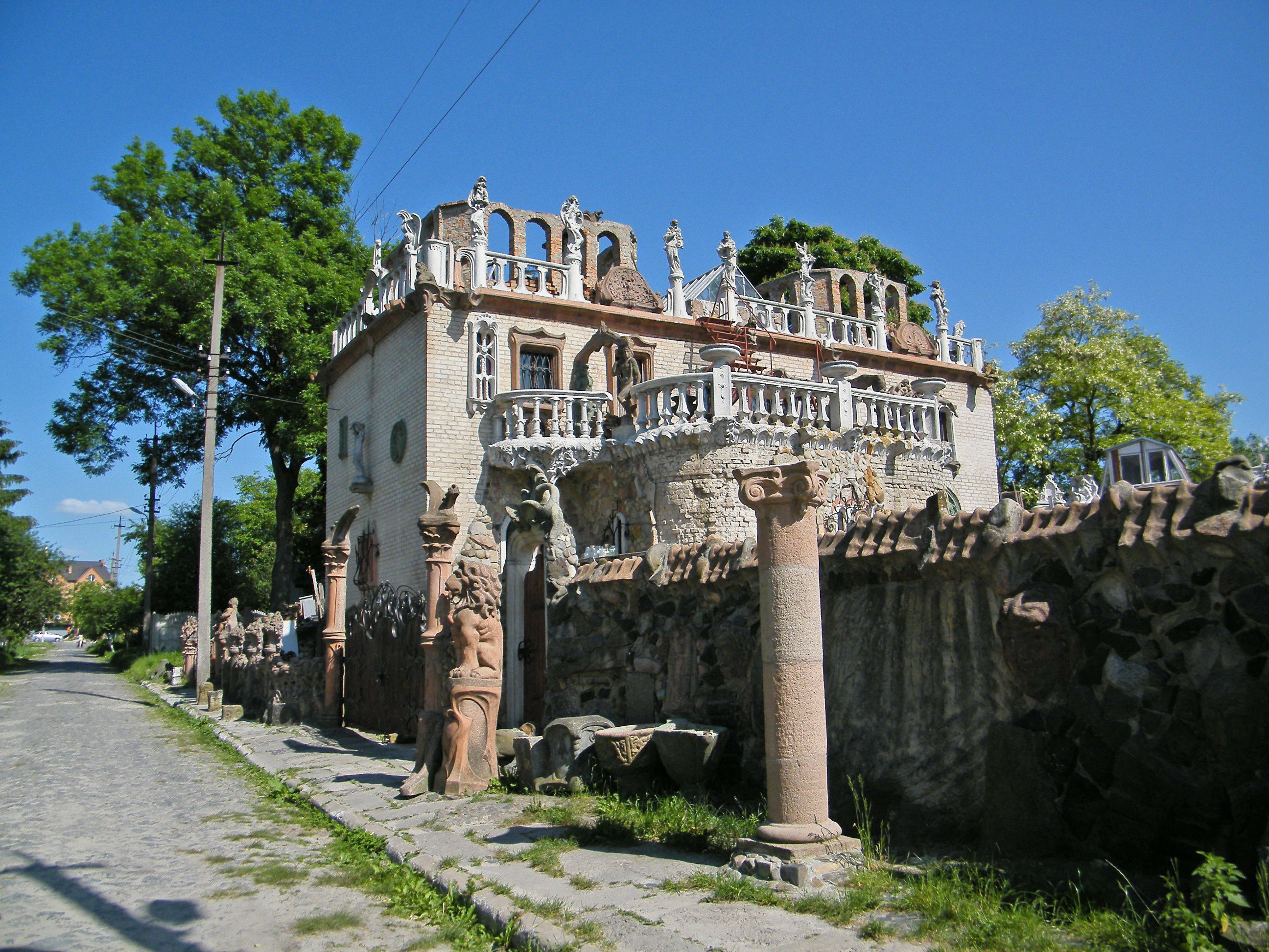 Дом скульптора